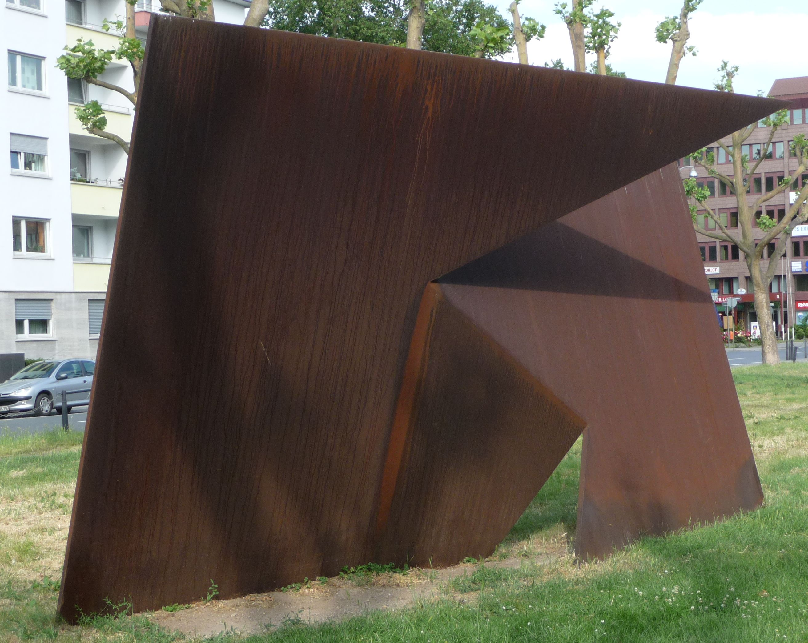 Skulpturenmeile Mannheim